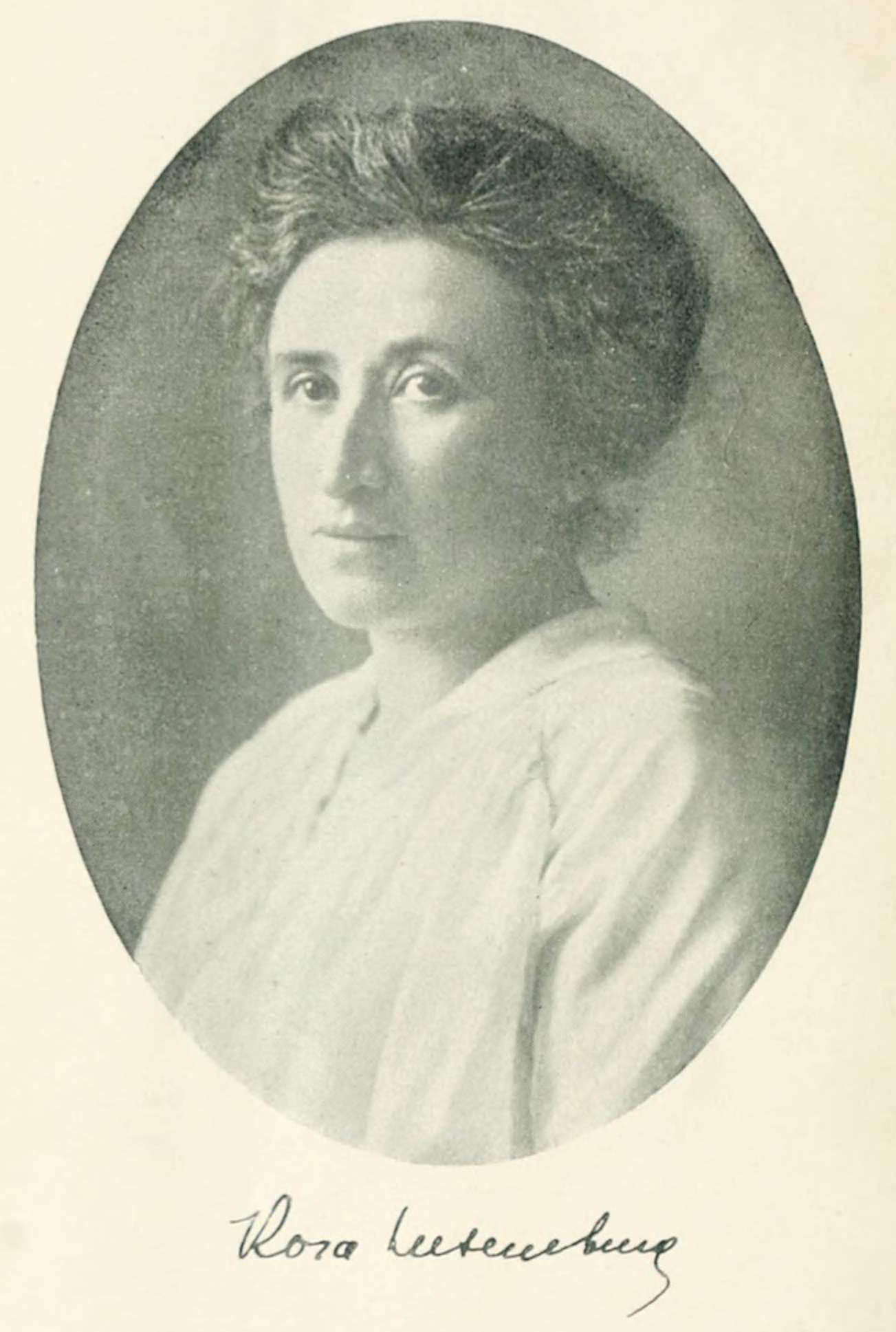 Portrait Rosa Luxemburg.